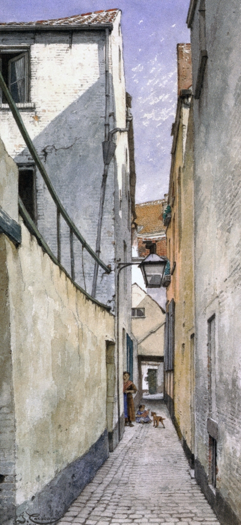 Peinture de Jacques Carabain, ca. 1897 Crayon et aquarelle sur papier Quartier du Deuvelshoek, couloir sud de l'impasse de la Perle d'Amour